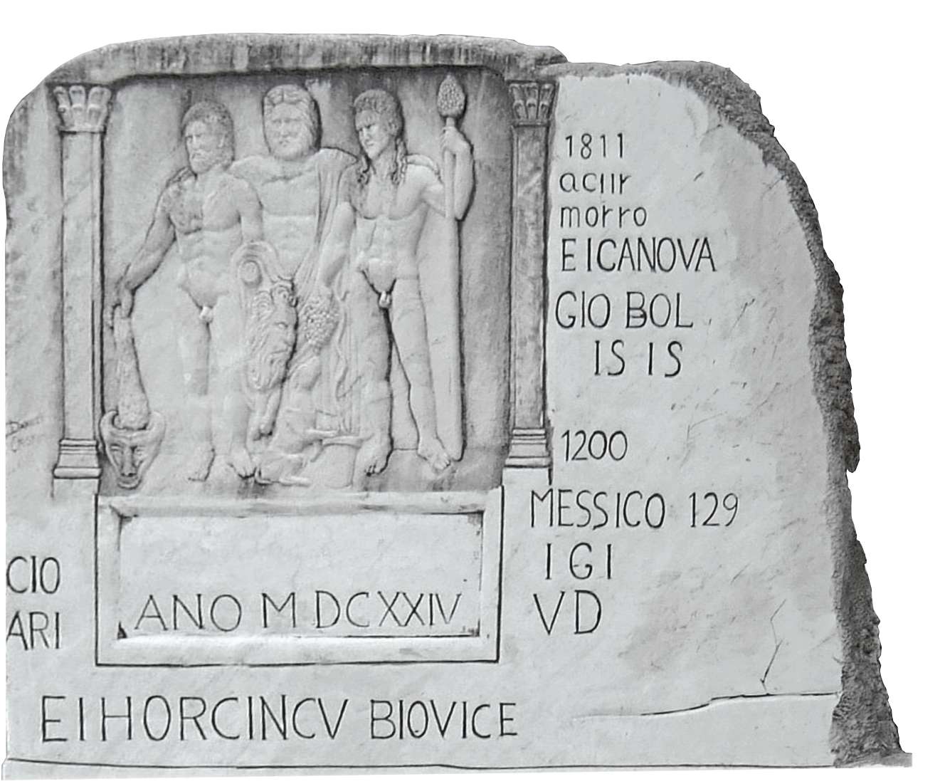 Calco di un bassorilievo di epoca romana (Carrara) – Italia.